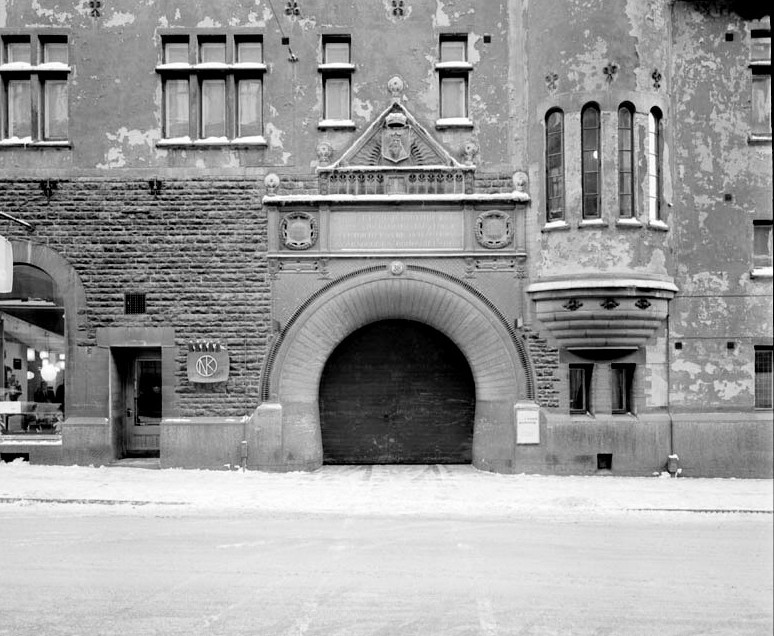 Brunkebergsverket, när NK redan flyttad in, 1960